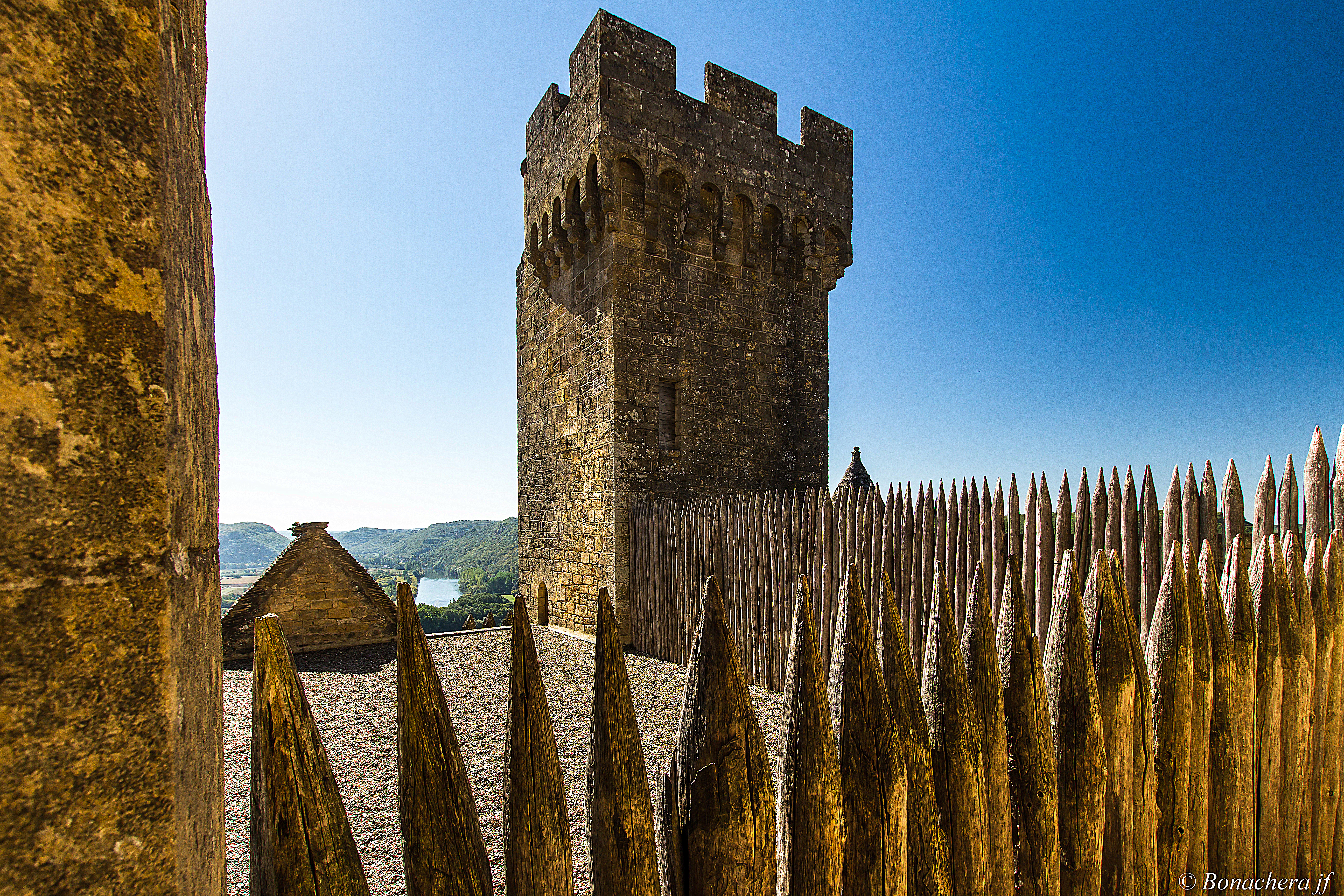 Le donjon roman carré